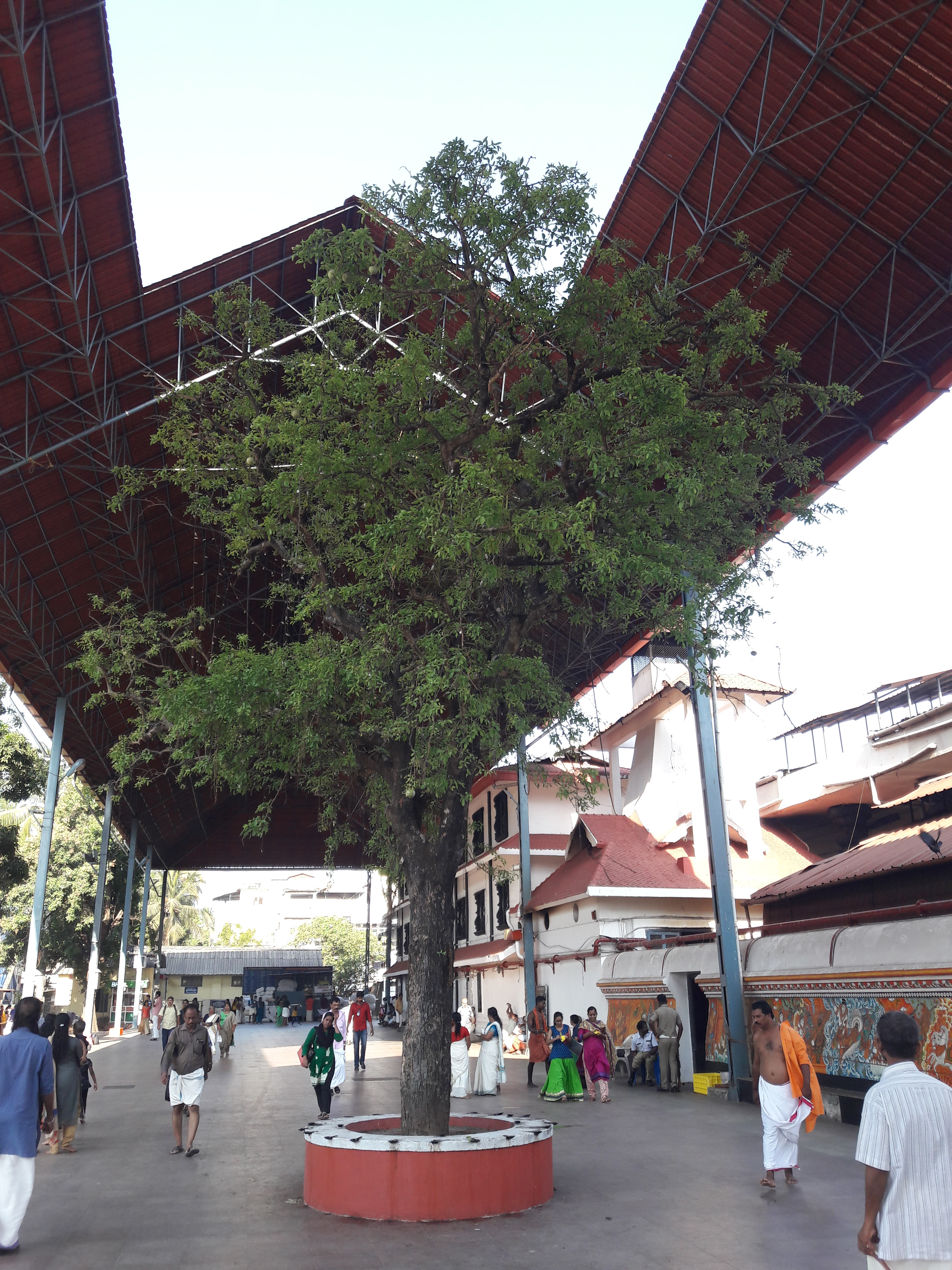 ഗുരുവായൂര്‍ ക്ഷേത്രത്തിലെ ഒരു കൂവളം.ശാസ്ത്രീയ നാമം Aegle marmelos കുടുംബം Rutaceae.